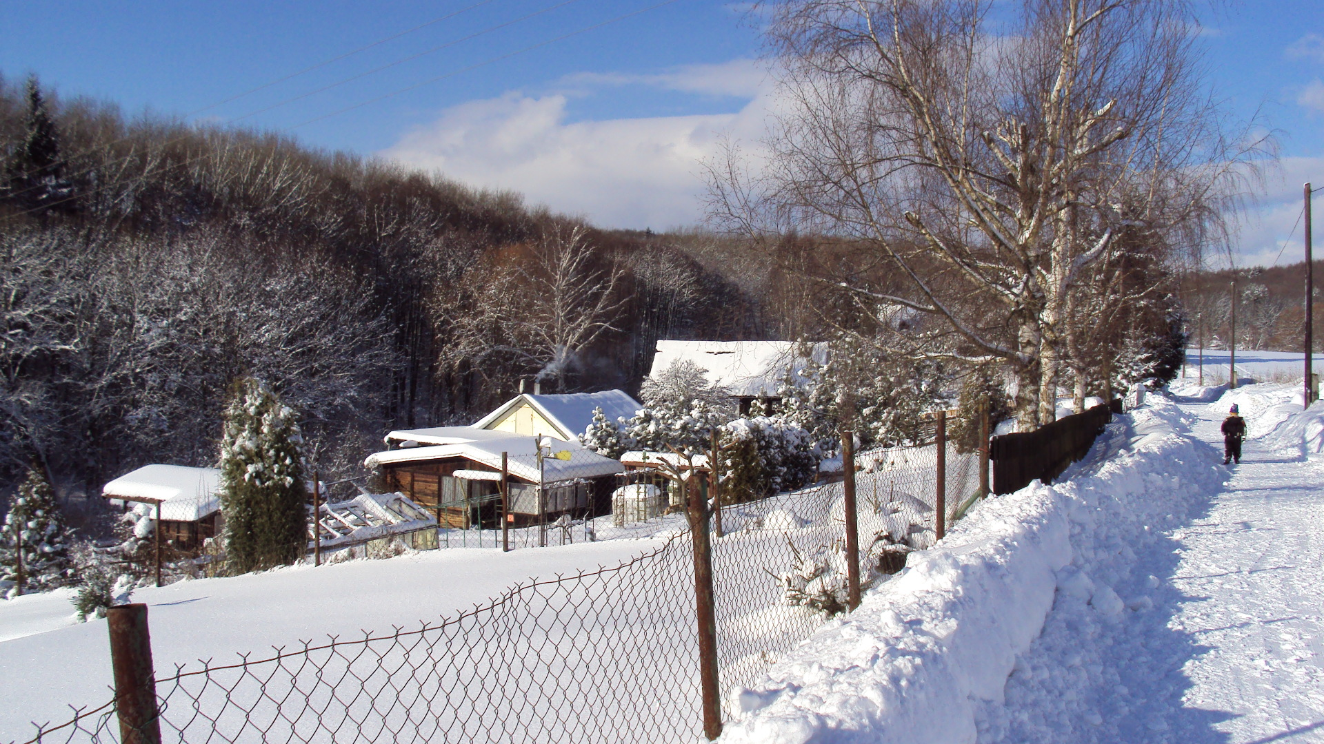 Začátek zahrádkářské kolonie Nových Zákup